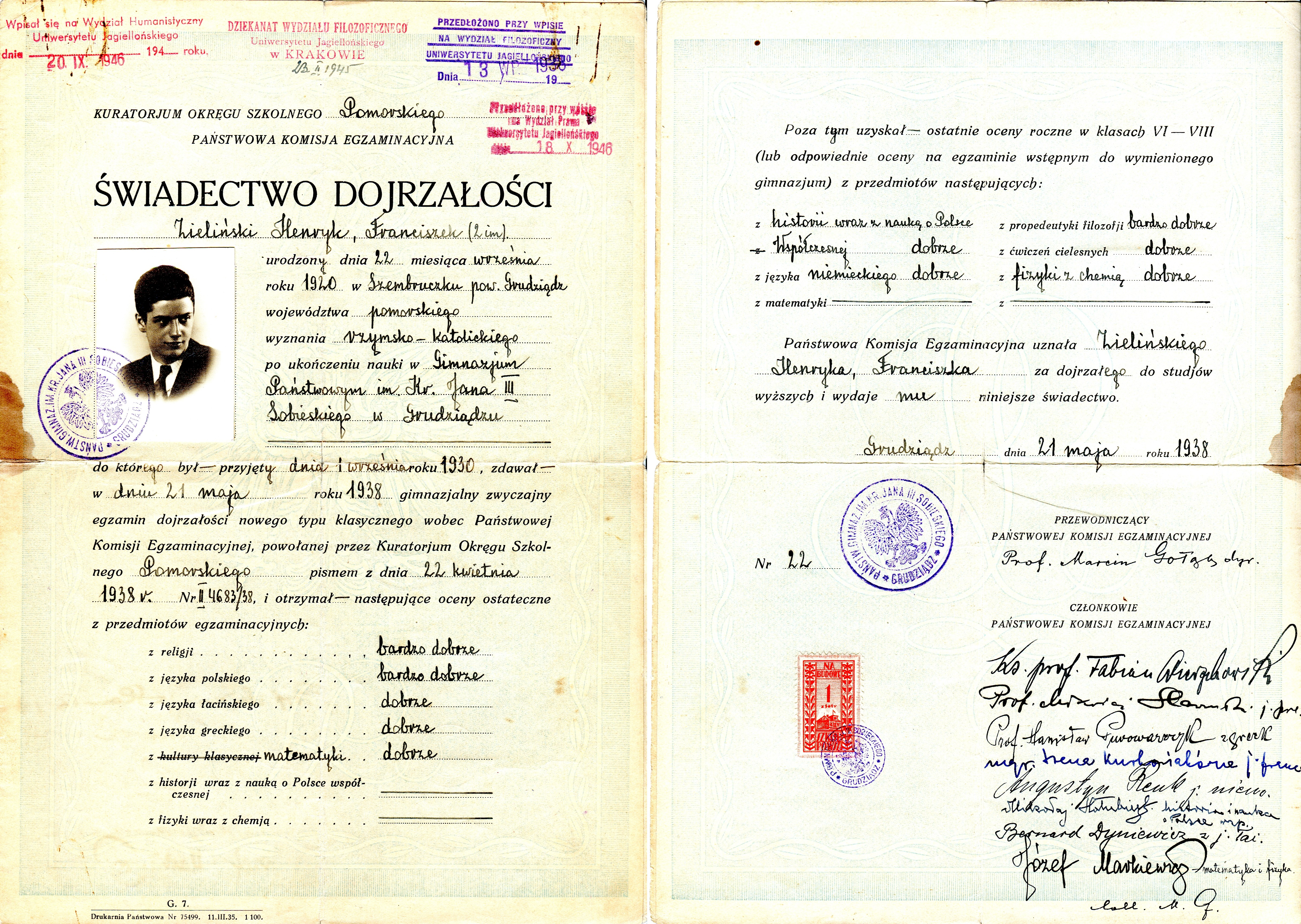 Henryk Zieliński świadectwo dojrzałości (obie strony)